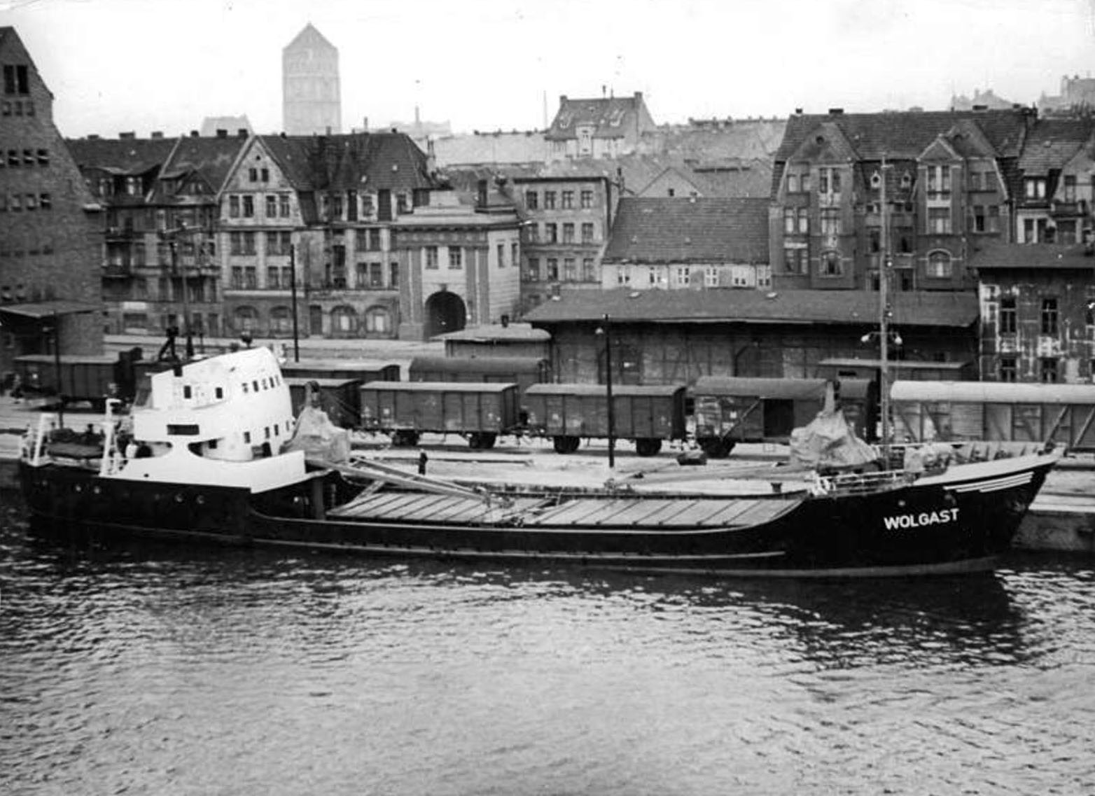 Rostock, Hafen, Frachter Zentralbild Löwe 23.5.1957 Ho.- Reger Betrieb im Hafen von Rostock. Das Küstenmotorschiff der Deutschen Seereederei "Wolgast" am Kai.